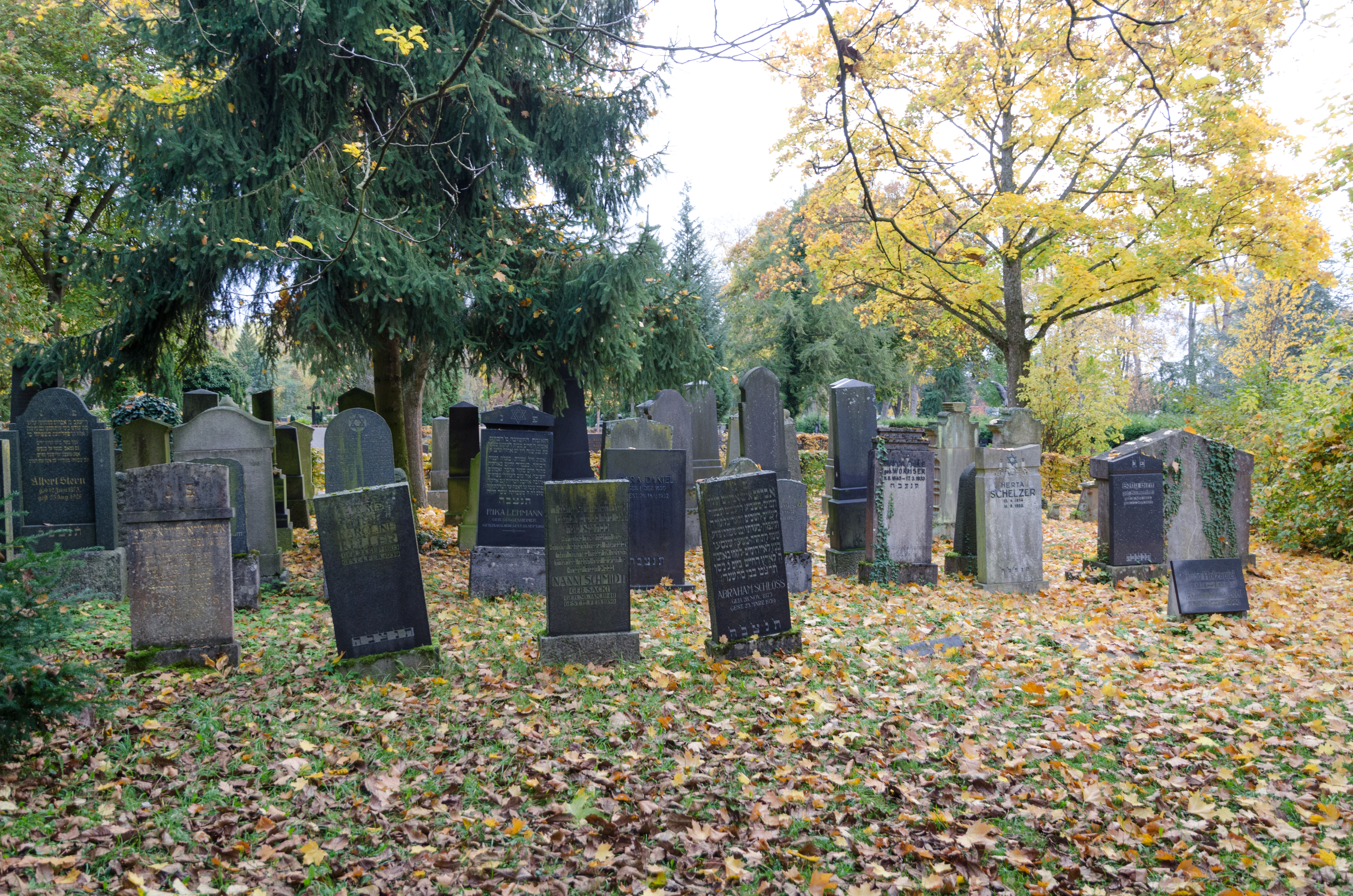 Schweinfurt, Hauptfriedhof, Jüdische Abteilung